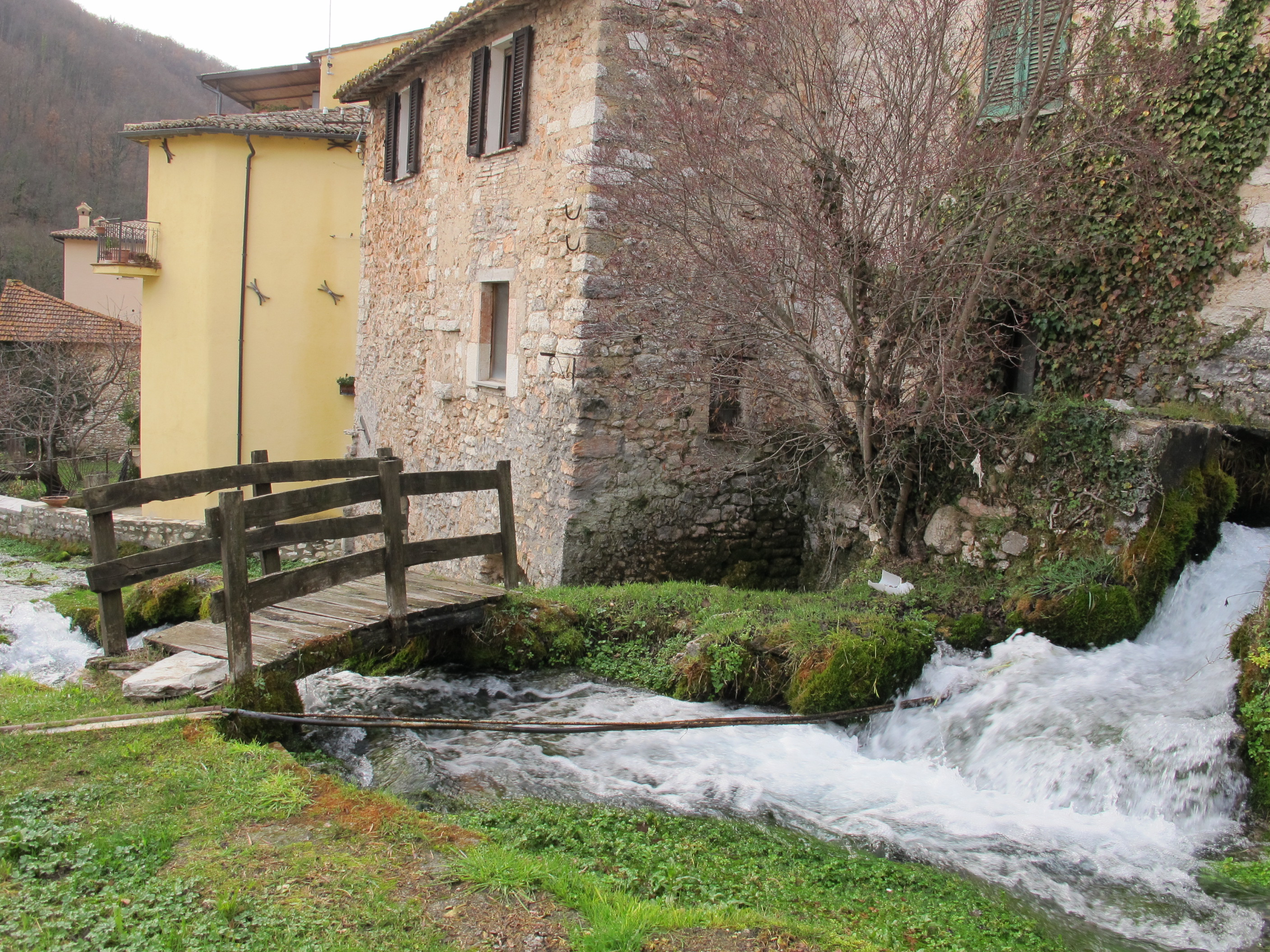 Rasiglia, canale